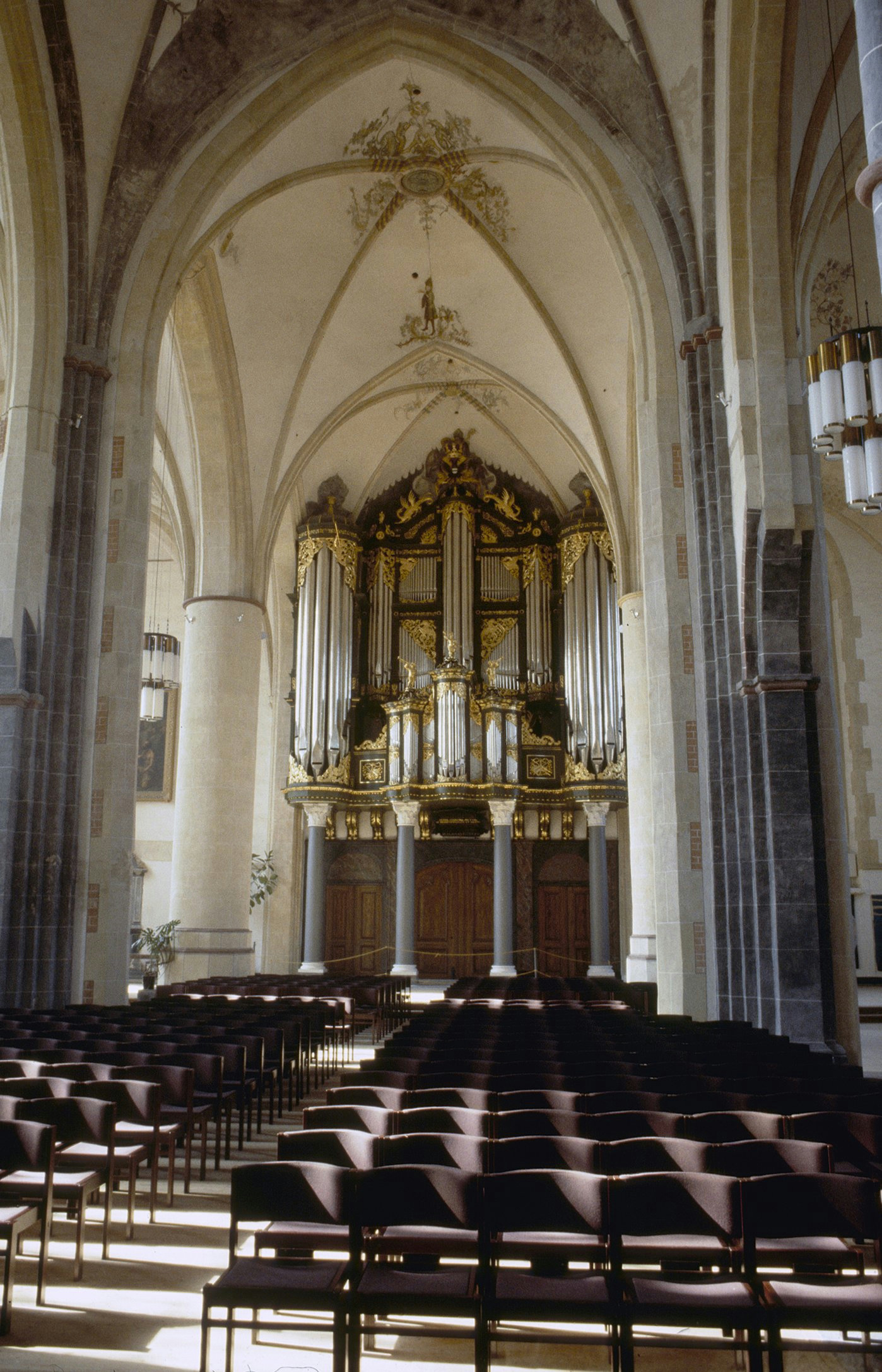 Martinikerk: INTERIEUR, OVERZICHT MIDDENSCHIP NAAR HET WESTEN MET ORGEL